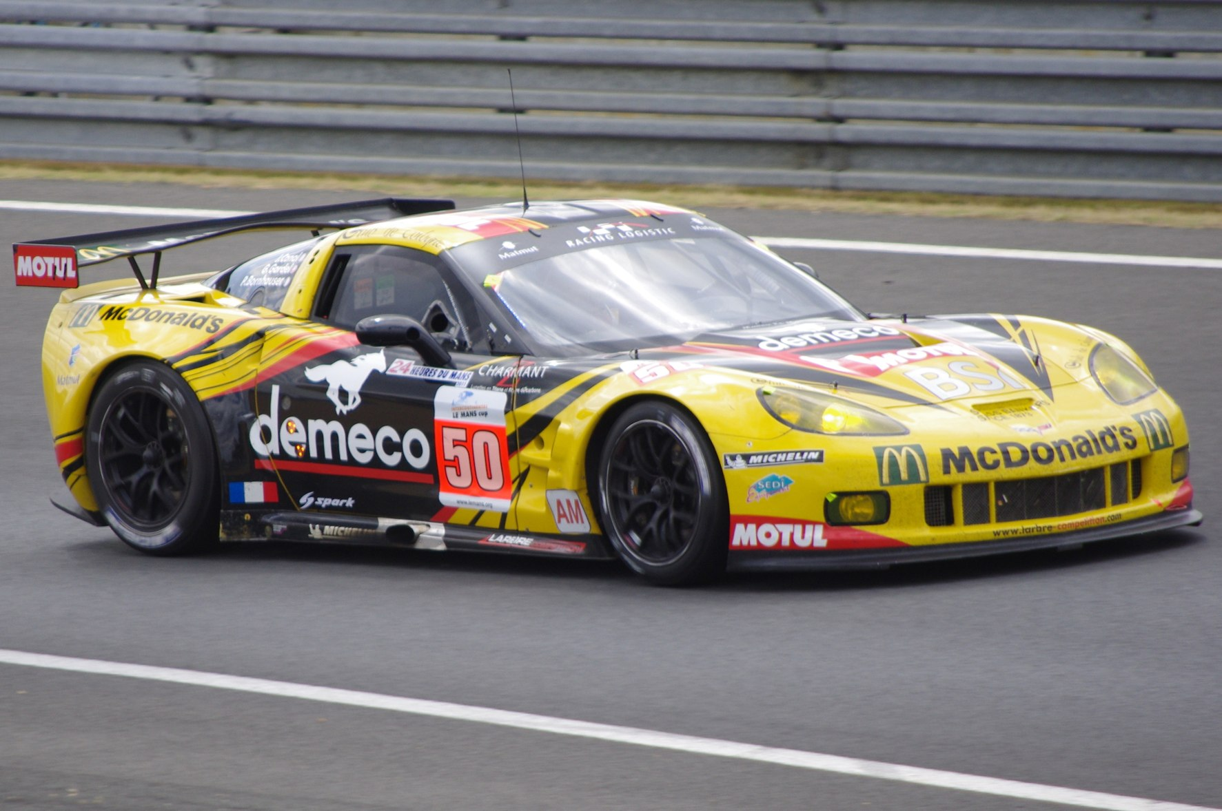 Le Mans 24 Hours 2011